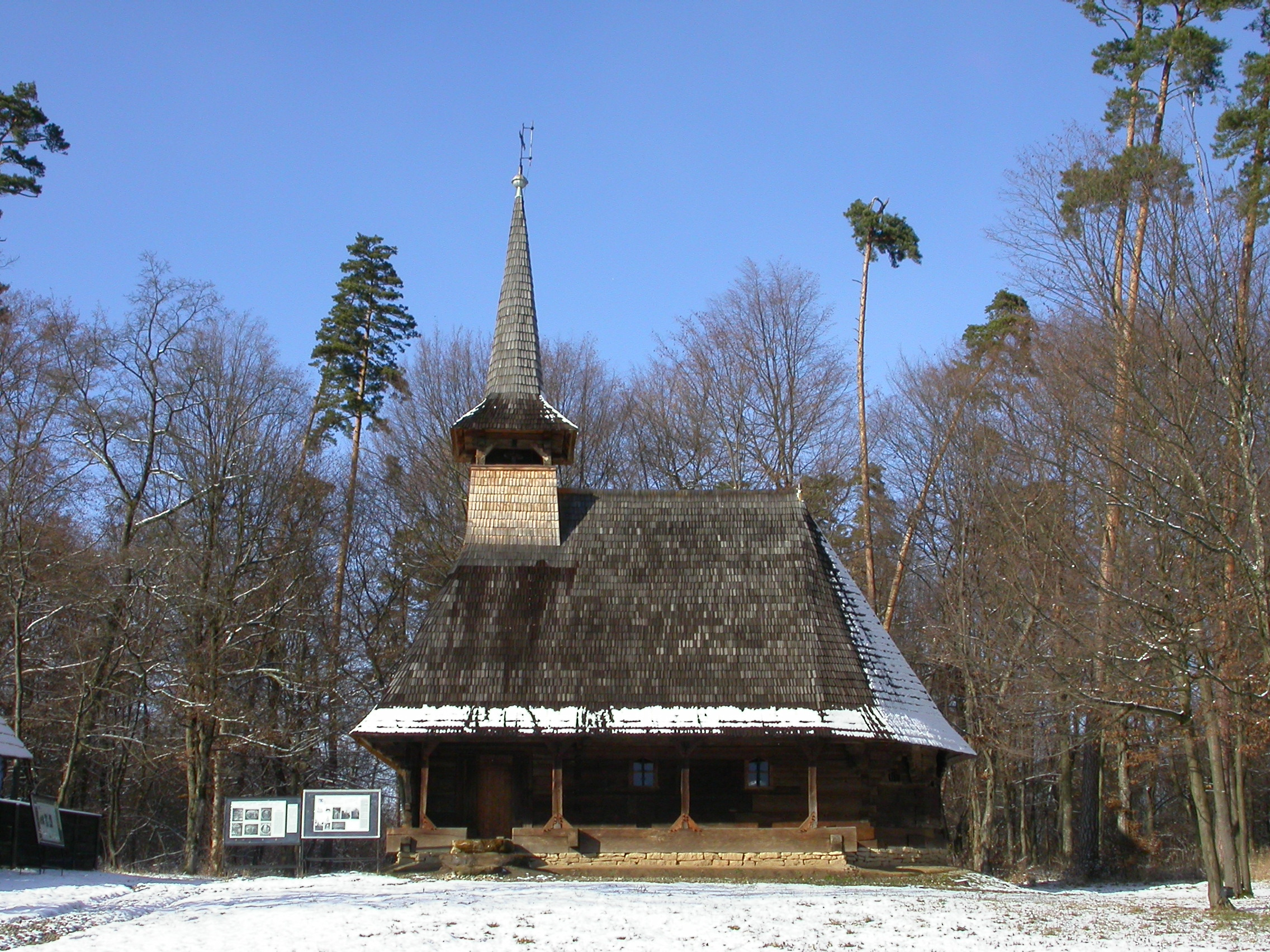 Muzeul Civilizației Populare Tradiționale ASTRA, 1963 (biserică de lemn transportat din satul Bezded, județul Sălaj)